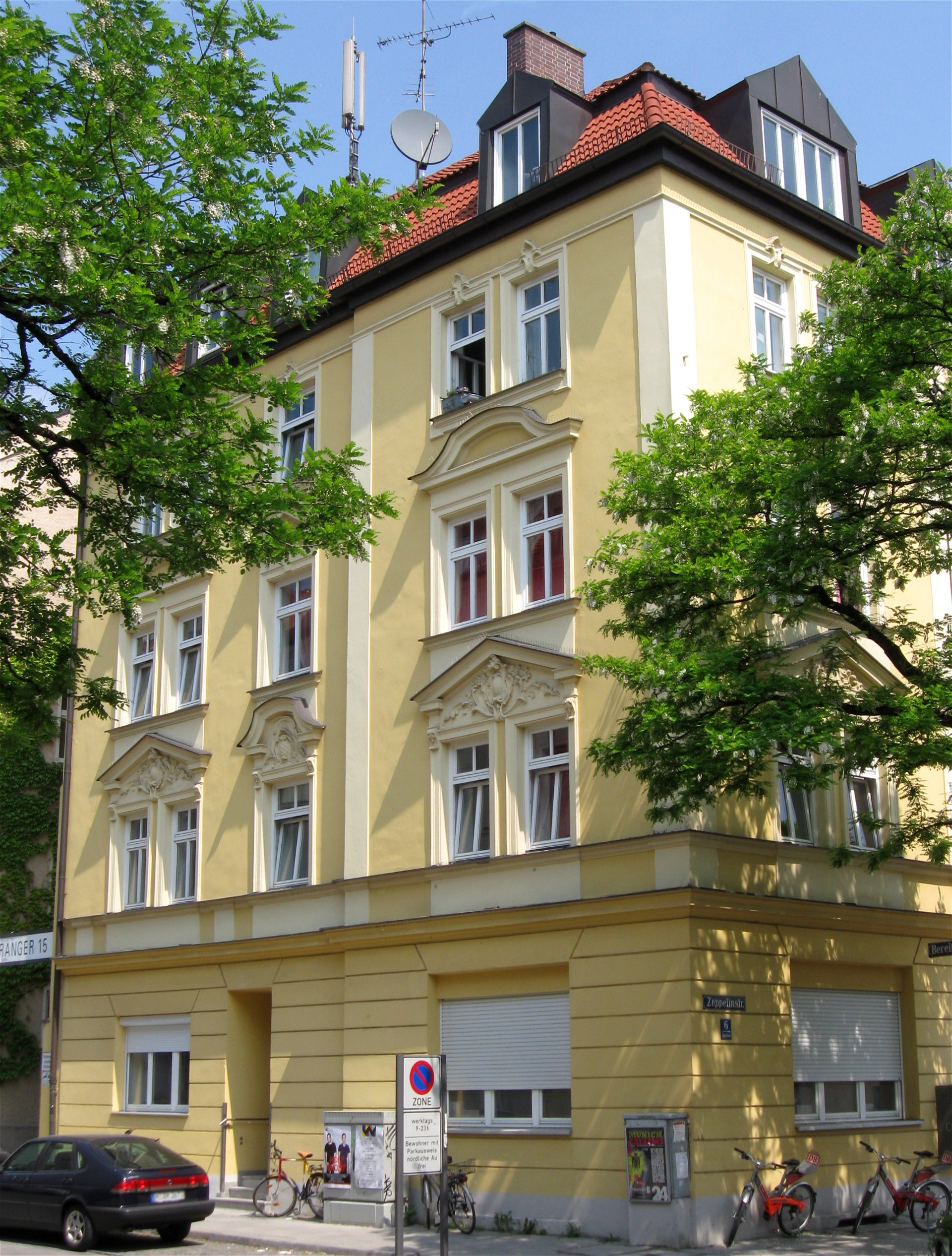 Zeppelinstraße 6; Mietshaus, neubarocker Eckbau, mit reicher Gliederung und Stuckdekor, 1896 von Carl Schmidt.